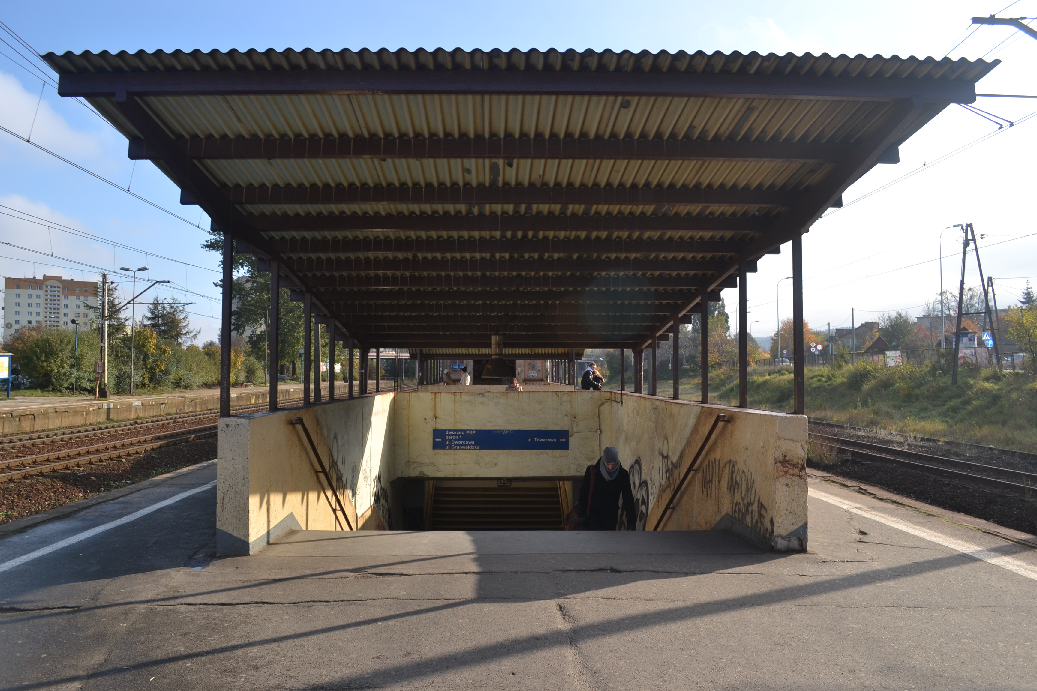 wiata peronowa w Rumii